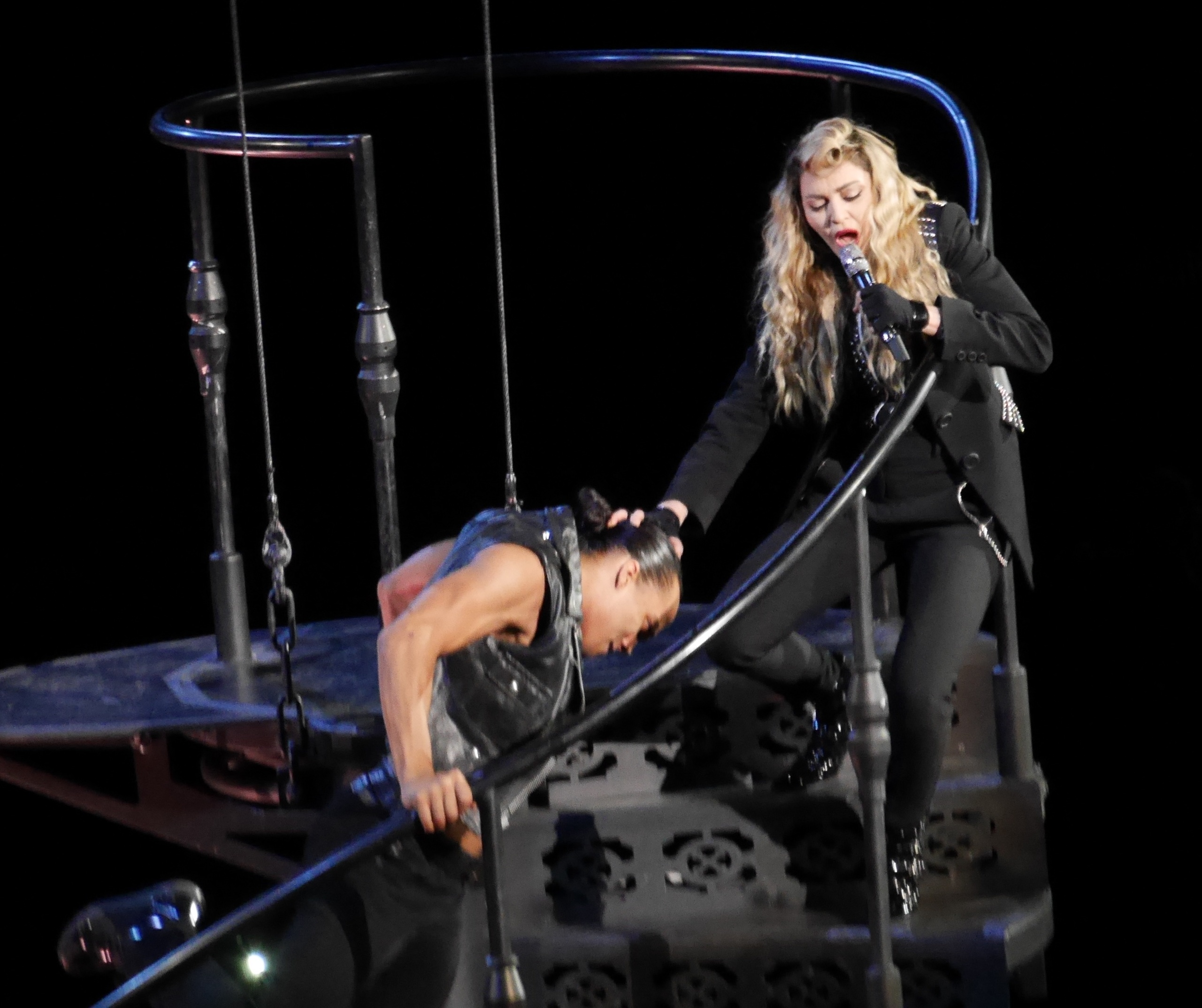 Rebel Heart Tour @ Amsterdam